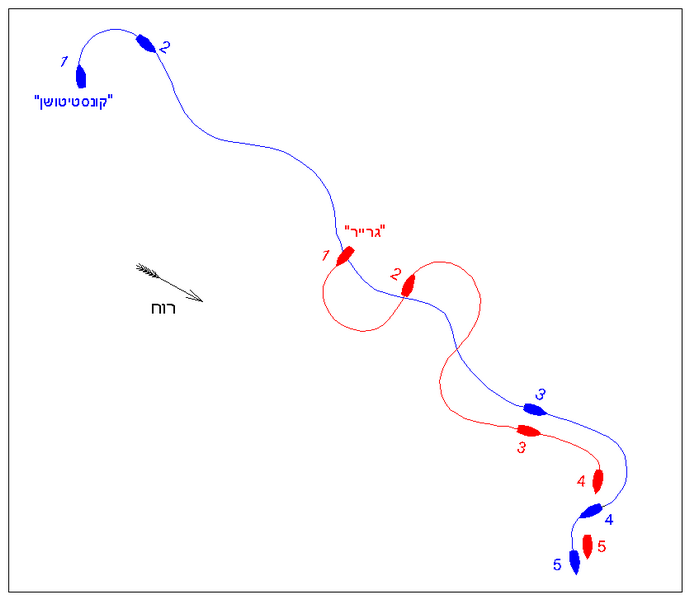 תרשים הקרב בין "קונסטיטושן" ל"גרייר", מלחמת 1812.